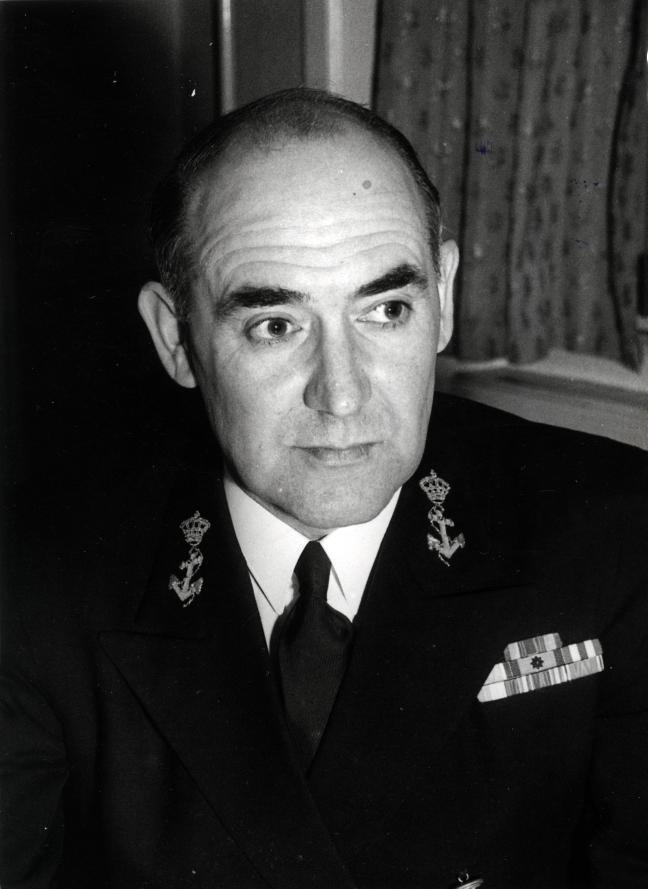 H.C.W. Moorman (KVP), Schout bij Nacht. Nederland, 13 maart 1951.